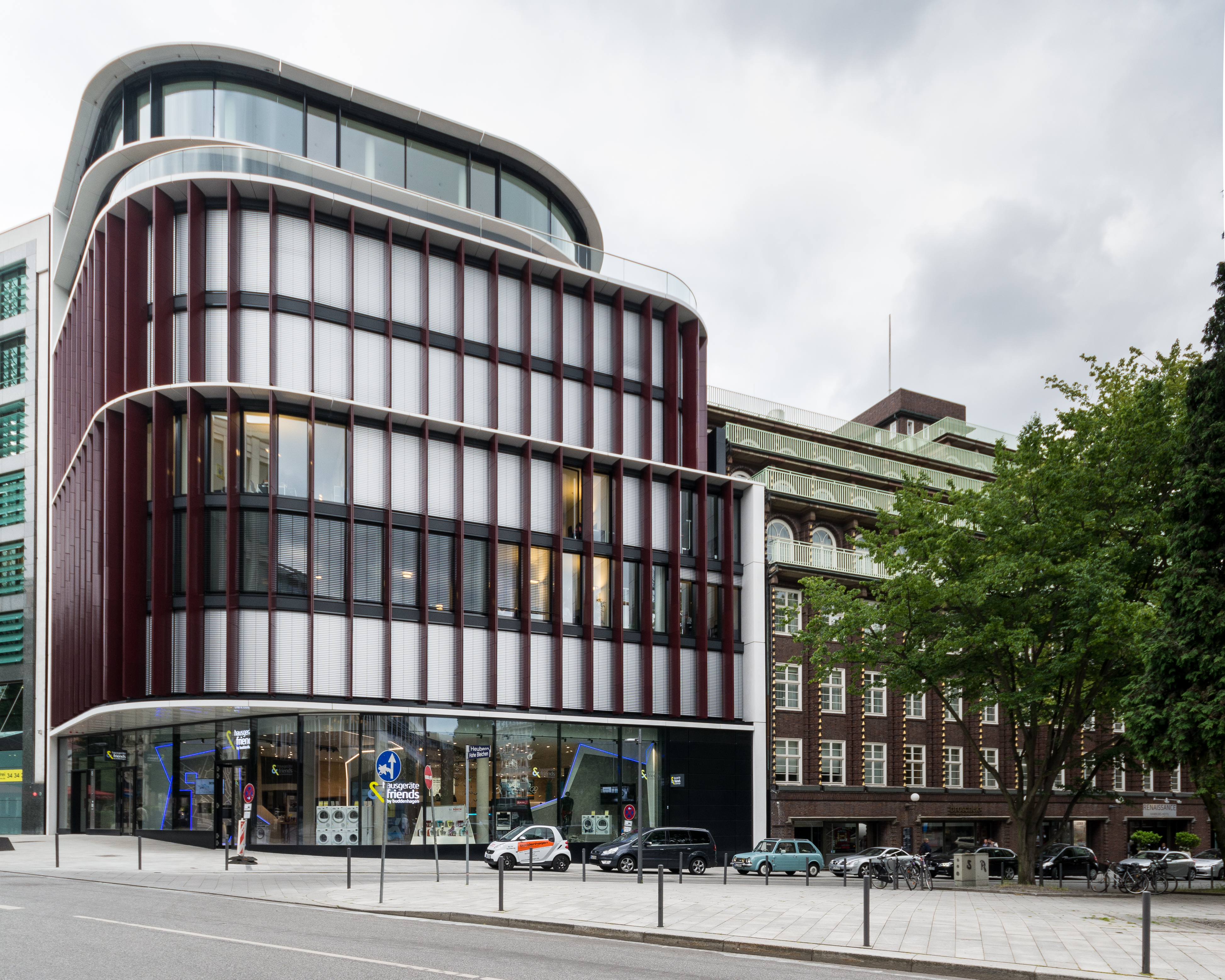 Bürogebäude Heuberg 1, Hohe Bleichen 8 und das Broschekhaus in Hamburg-Neustadt. This is a photograph of an architectural monument.